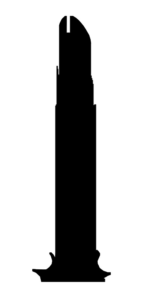 Diseño de la D1 Tower